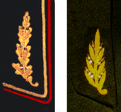 генералы рф